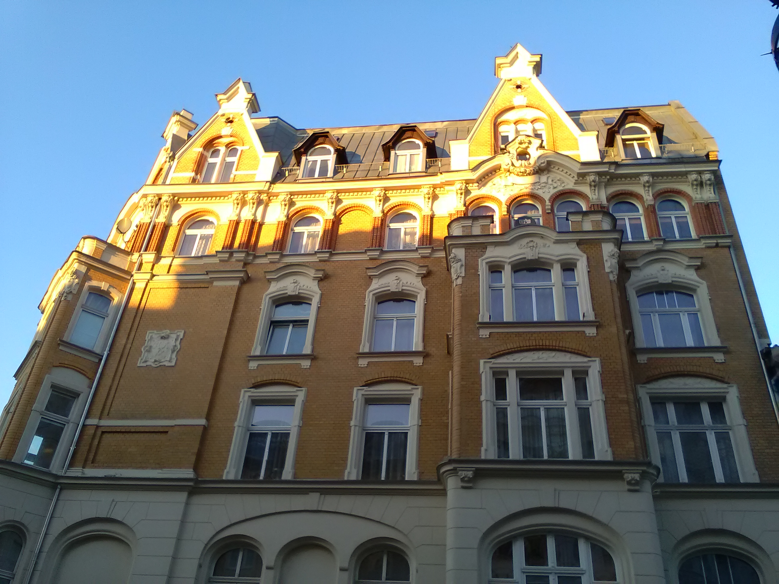 Ulica Wielka w Poznaniu- kamienica na rogu ulic Wielka i Szewska.